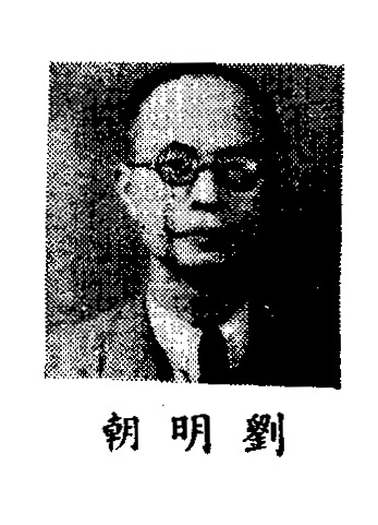 中文（中国大陆）: 制憲國民大會代表